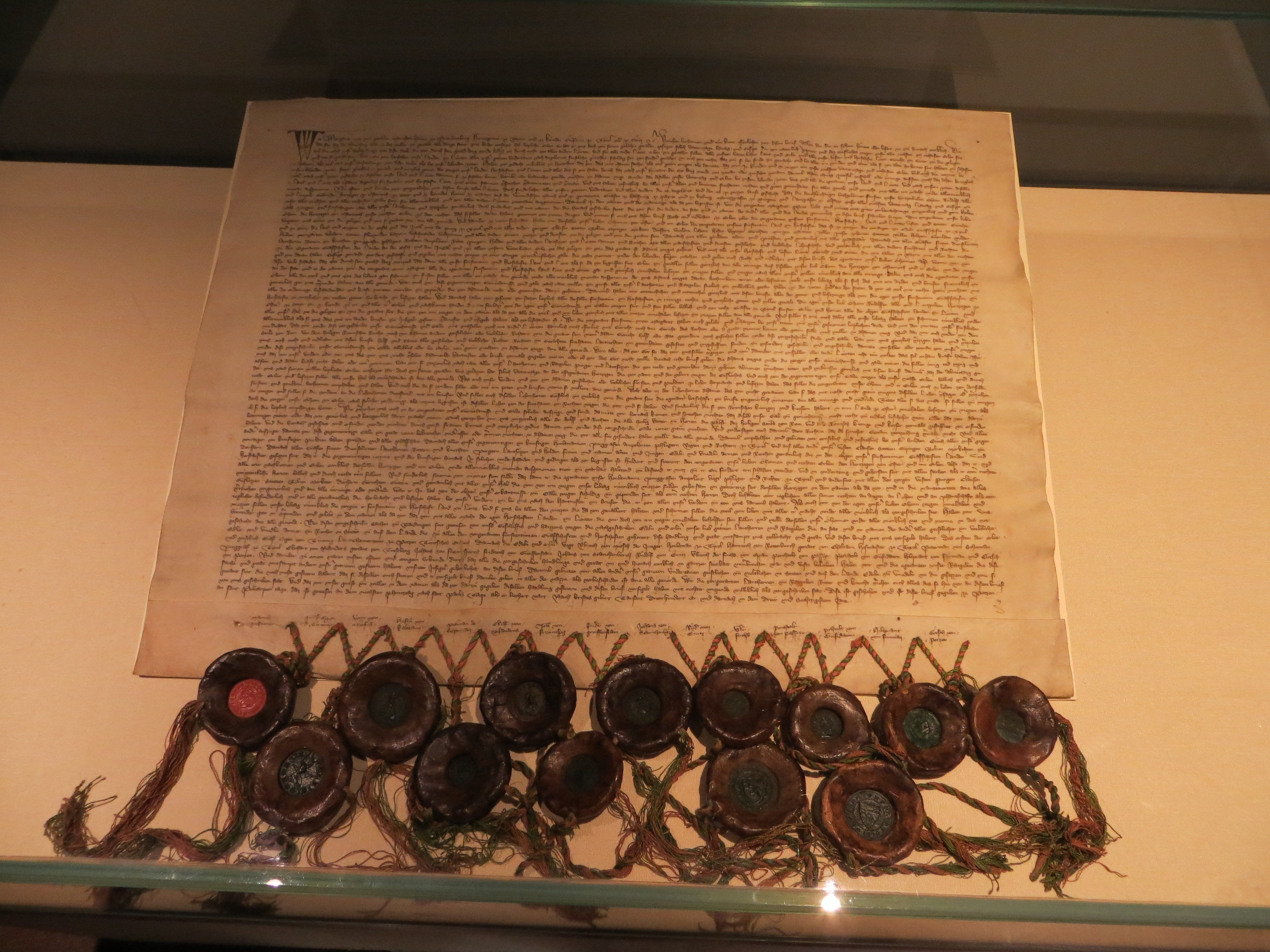 Runkelstein Castle. Mit dieser Urkunde vom 26. Januar 1363 wird die Übergabe der Grafschaft Tirol an die Habsburger bestätigt.